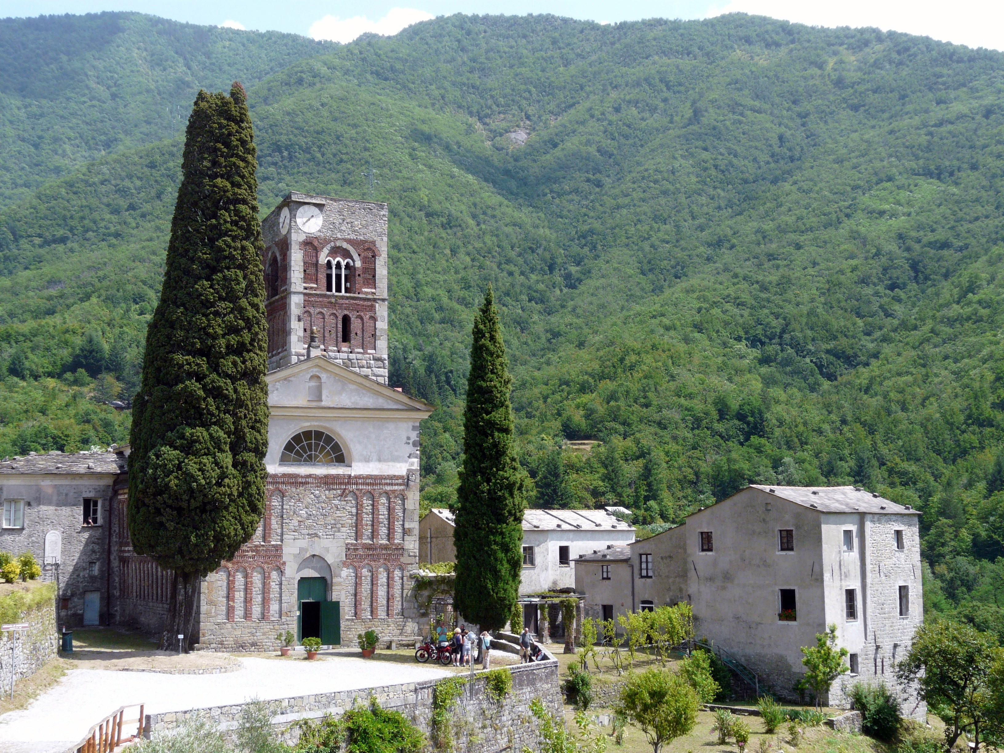 Il complesso dell'abbazia di Sant'Andrea di Borzone, Borzonasca, Liguria, Italia